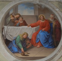 Affresco - La mMddalena - Chiesa S. Pietro Martire di Baruffini